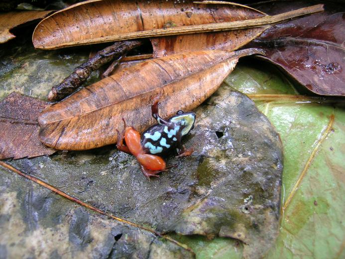 Ranomafana National Park Mantella bernhardi